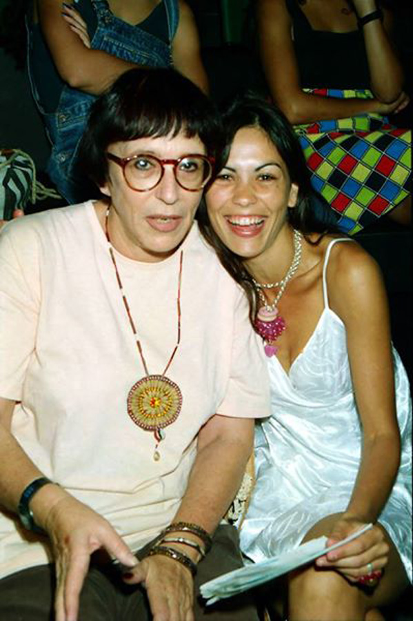 לביאה הון ומיכל זוארץ